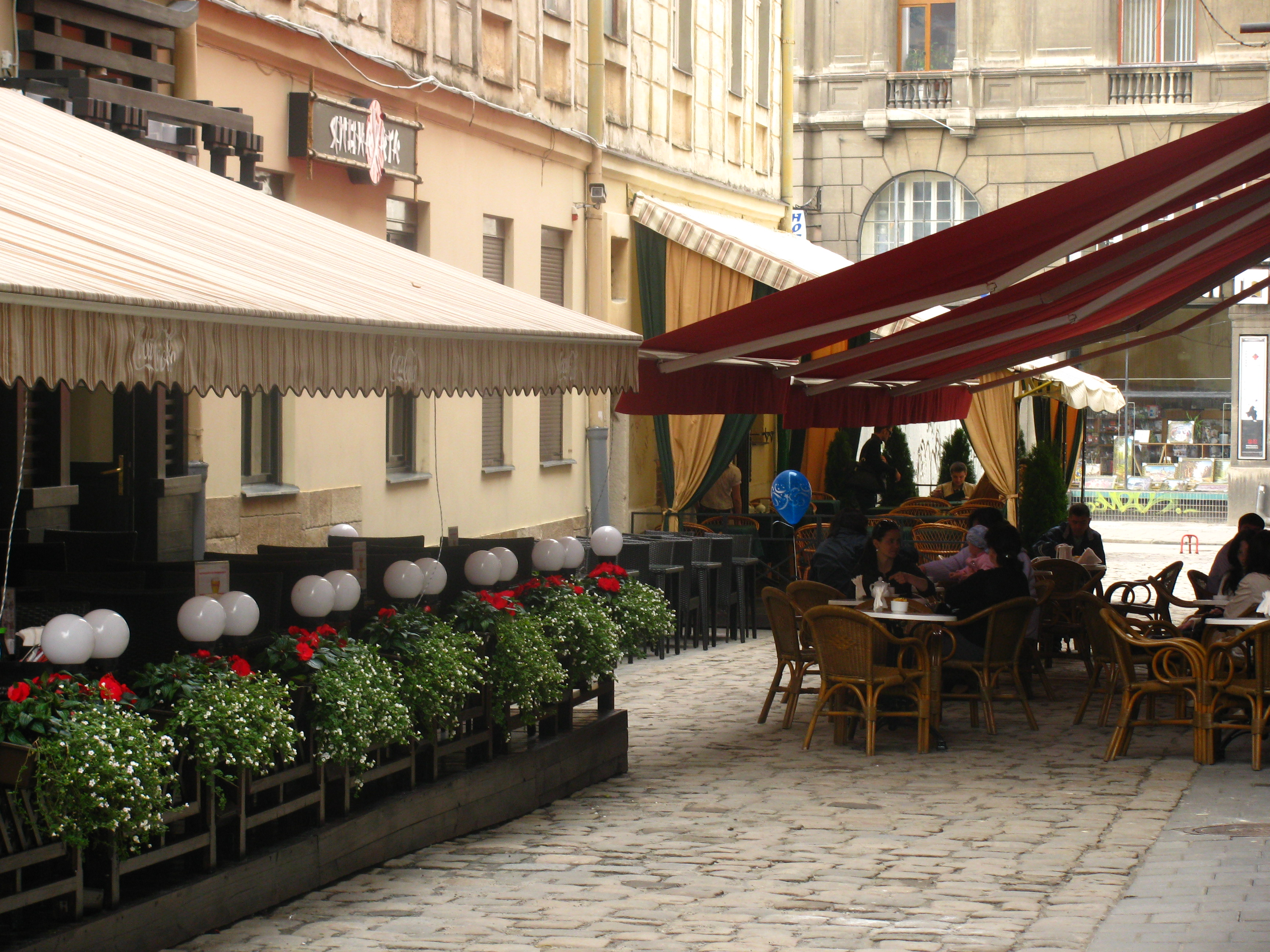 Вулиця Староєврейська.jpg: відкриті тераси біля ресторацій на вулиці Староєврейській в історичному центрі міста Львова